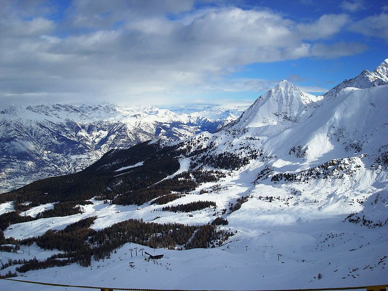 Panorama sulle piste di Pila